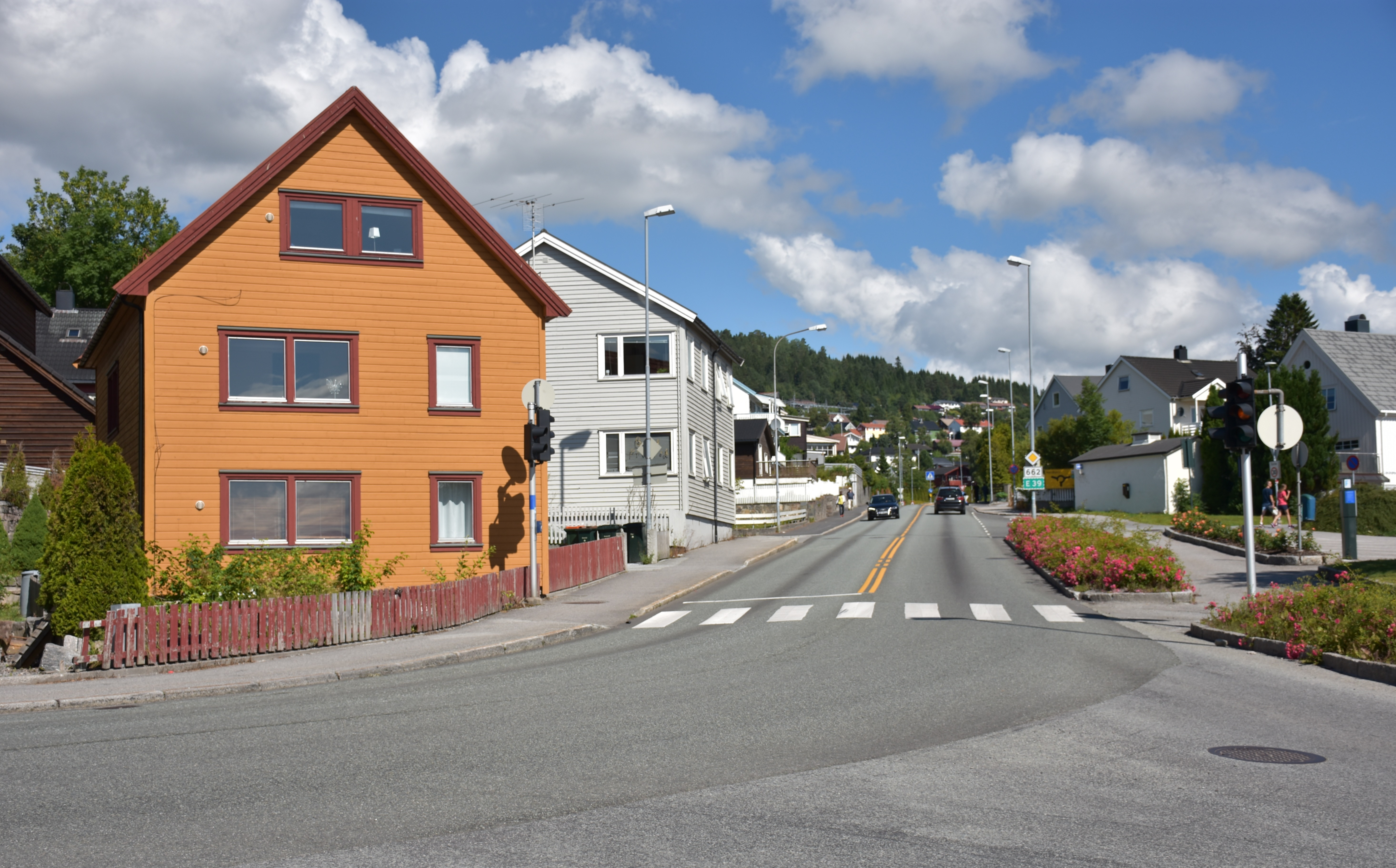 Nedre del av Frænavegen er fylkesvei 662.